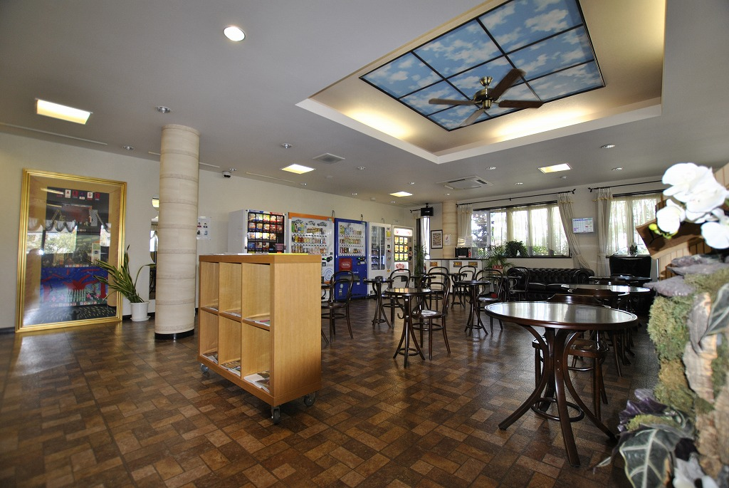 校内 くつろぎスペース・ラウンジの風景